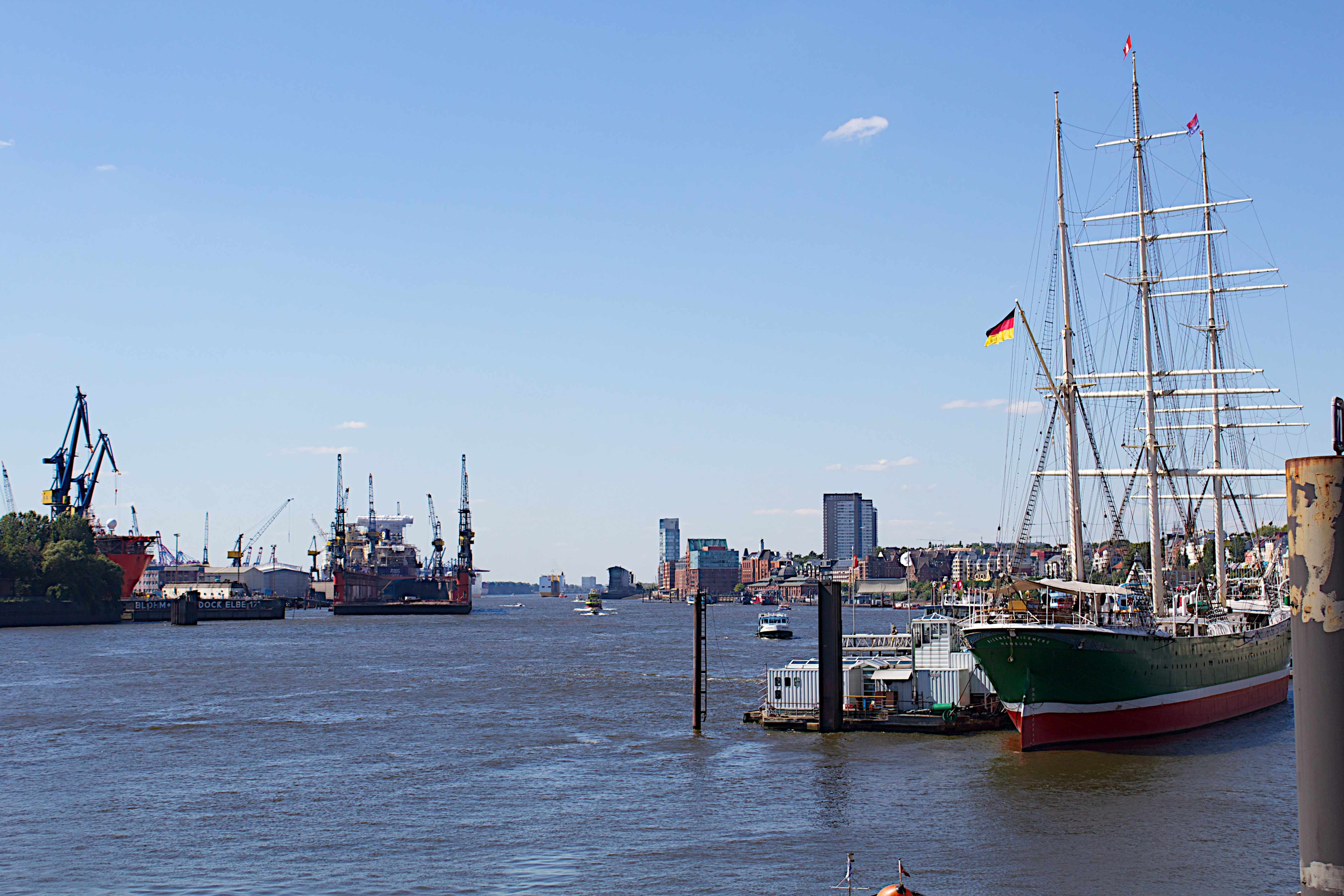 Hamburg